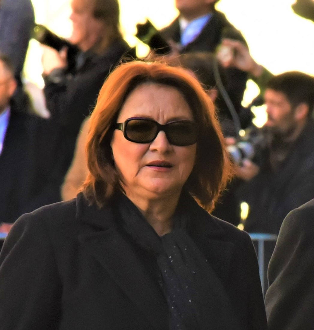 Česká herečka Zlata Adamovská